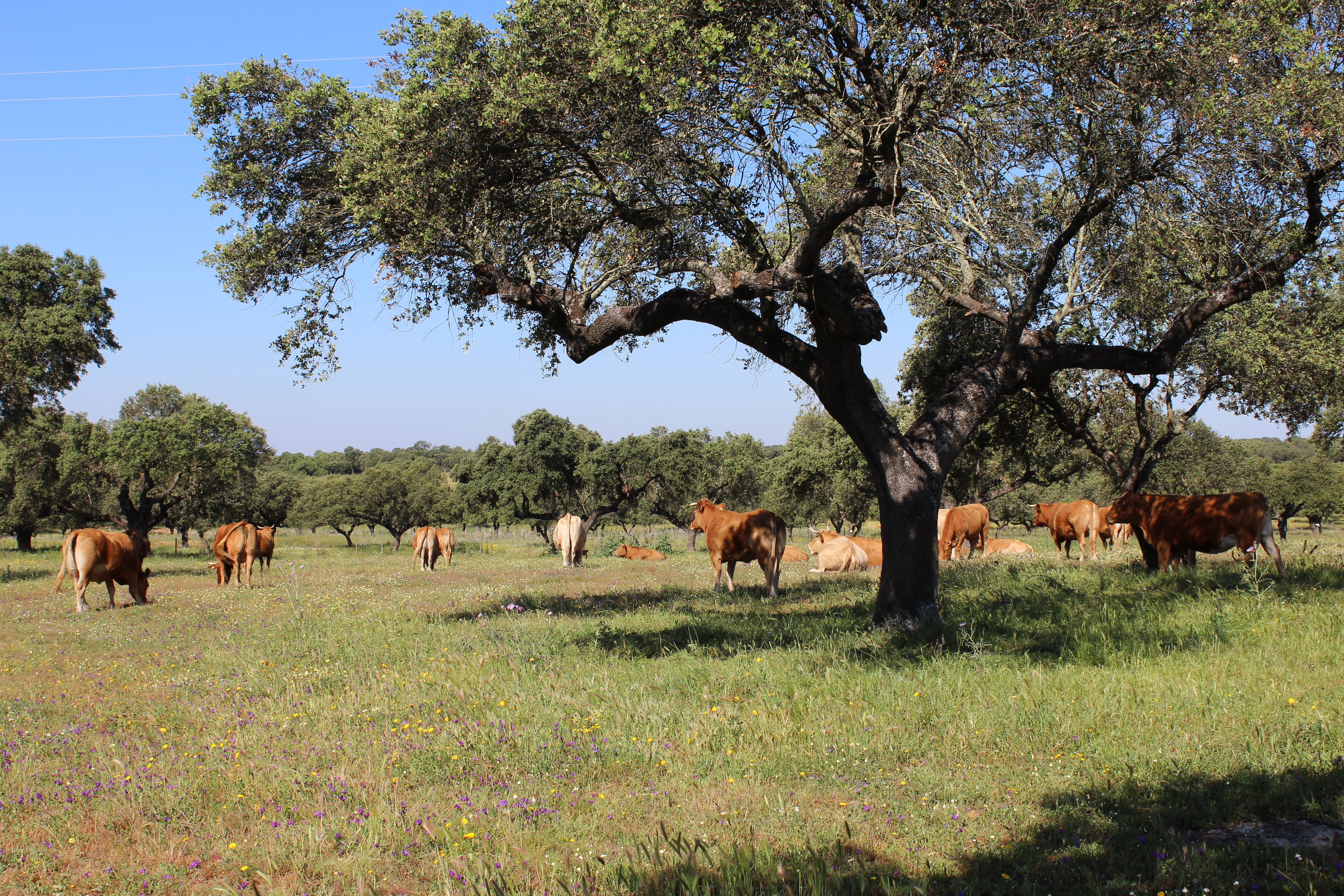 Dehesa Cabeza Rubia en Badajoz-Extremadura